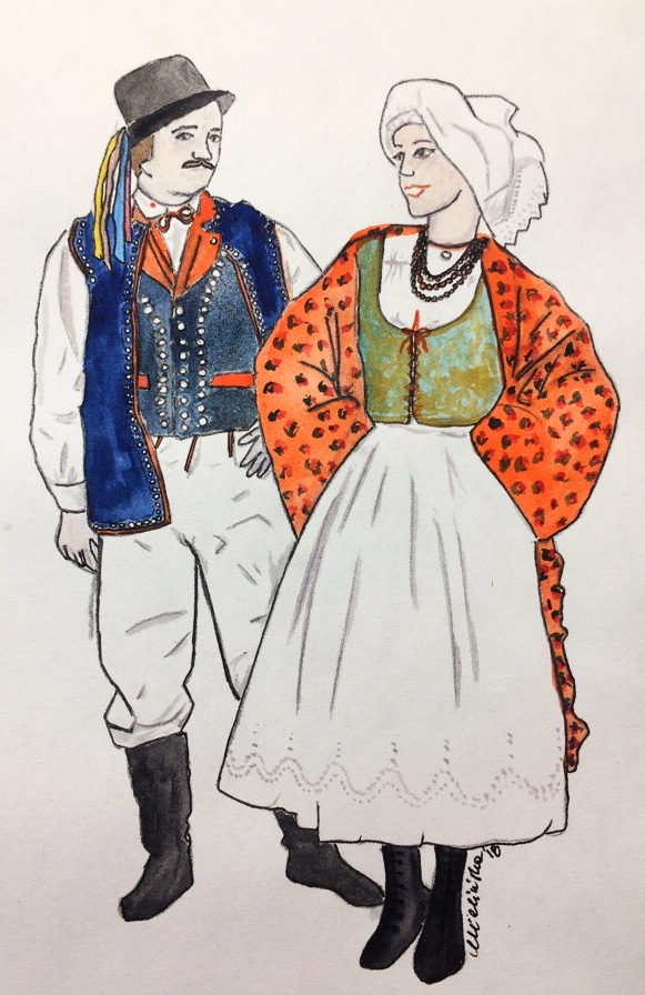 Strój Lachów Limanowskich